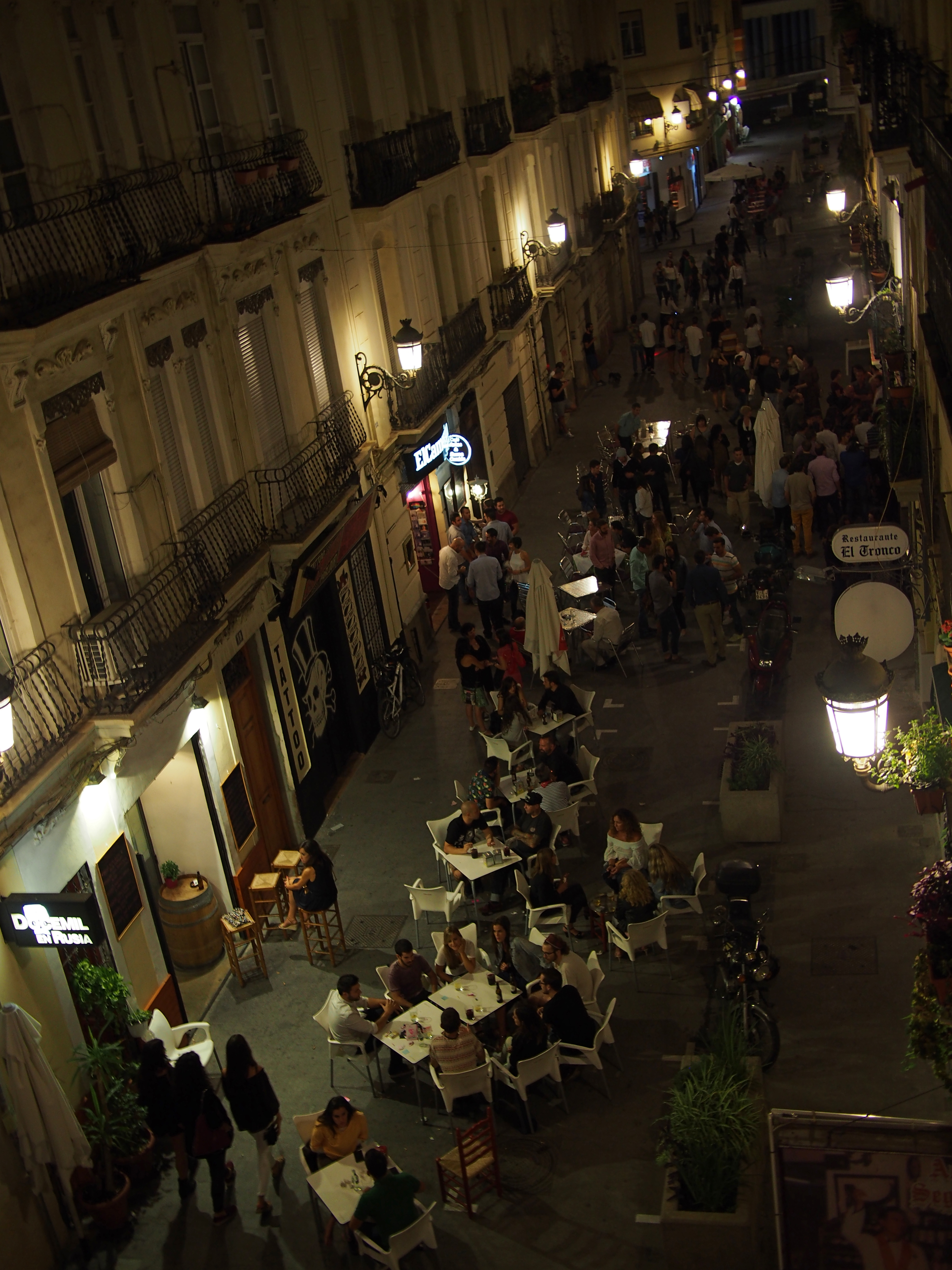 Masificación del Barrio de Ruzafa tras la reurbanización. Calle peatonal.